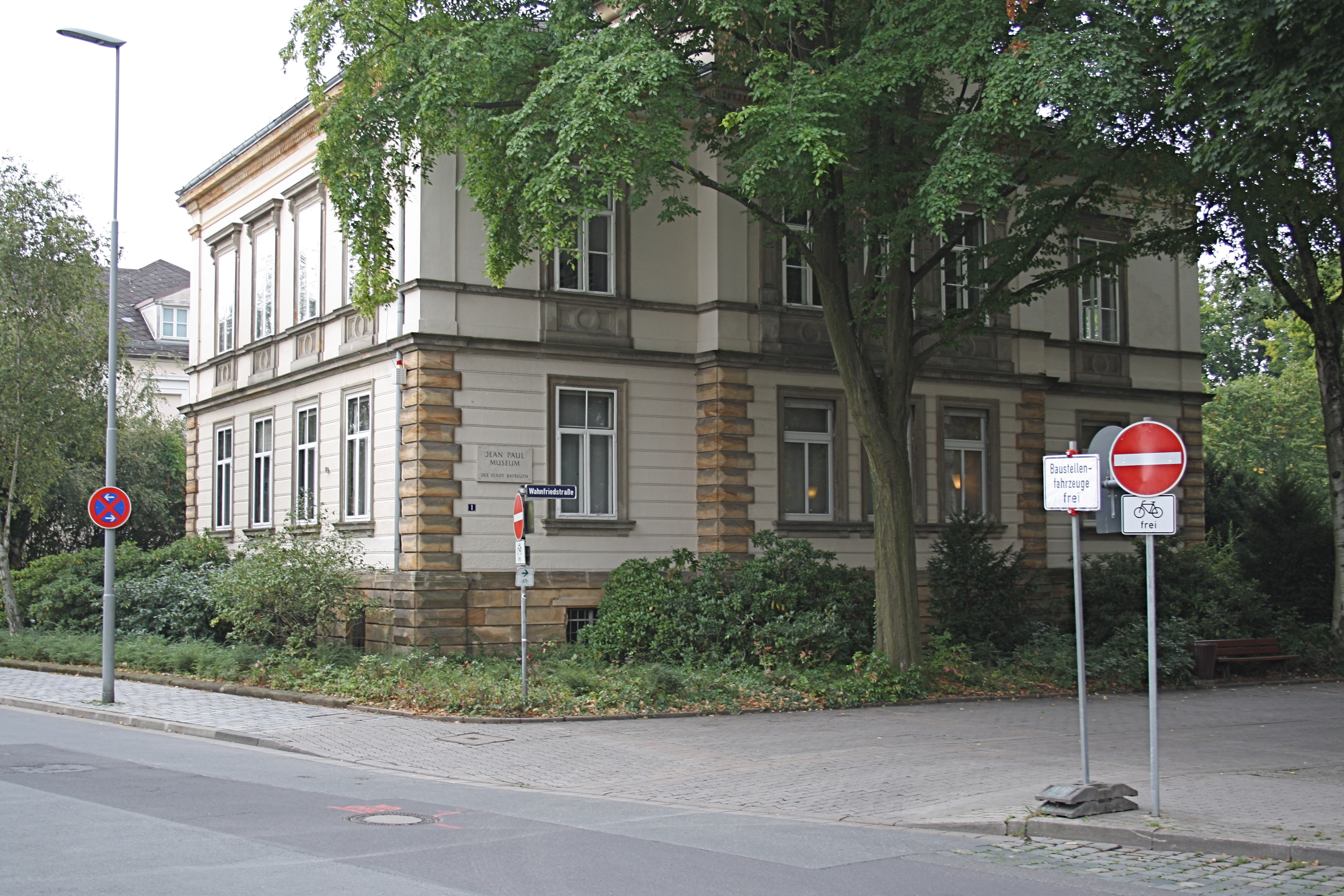 Bayreuth, Wahnfriedstrasse 1, ehem. Haus von Houston Stewart Chamberlain, jetzt Jean-Paul-Museum.